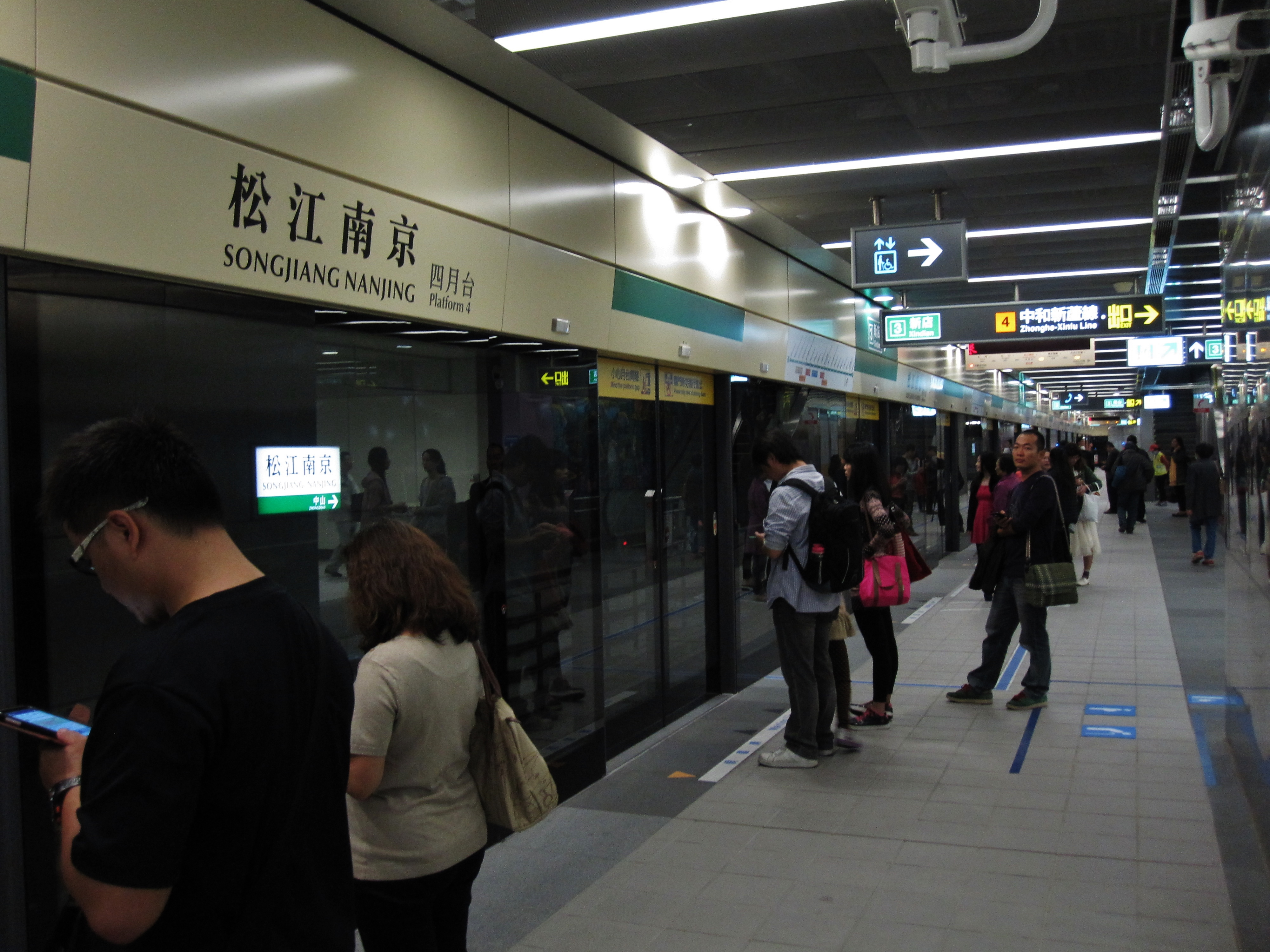 捷運松山線松江南京站四月台